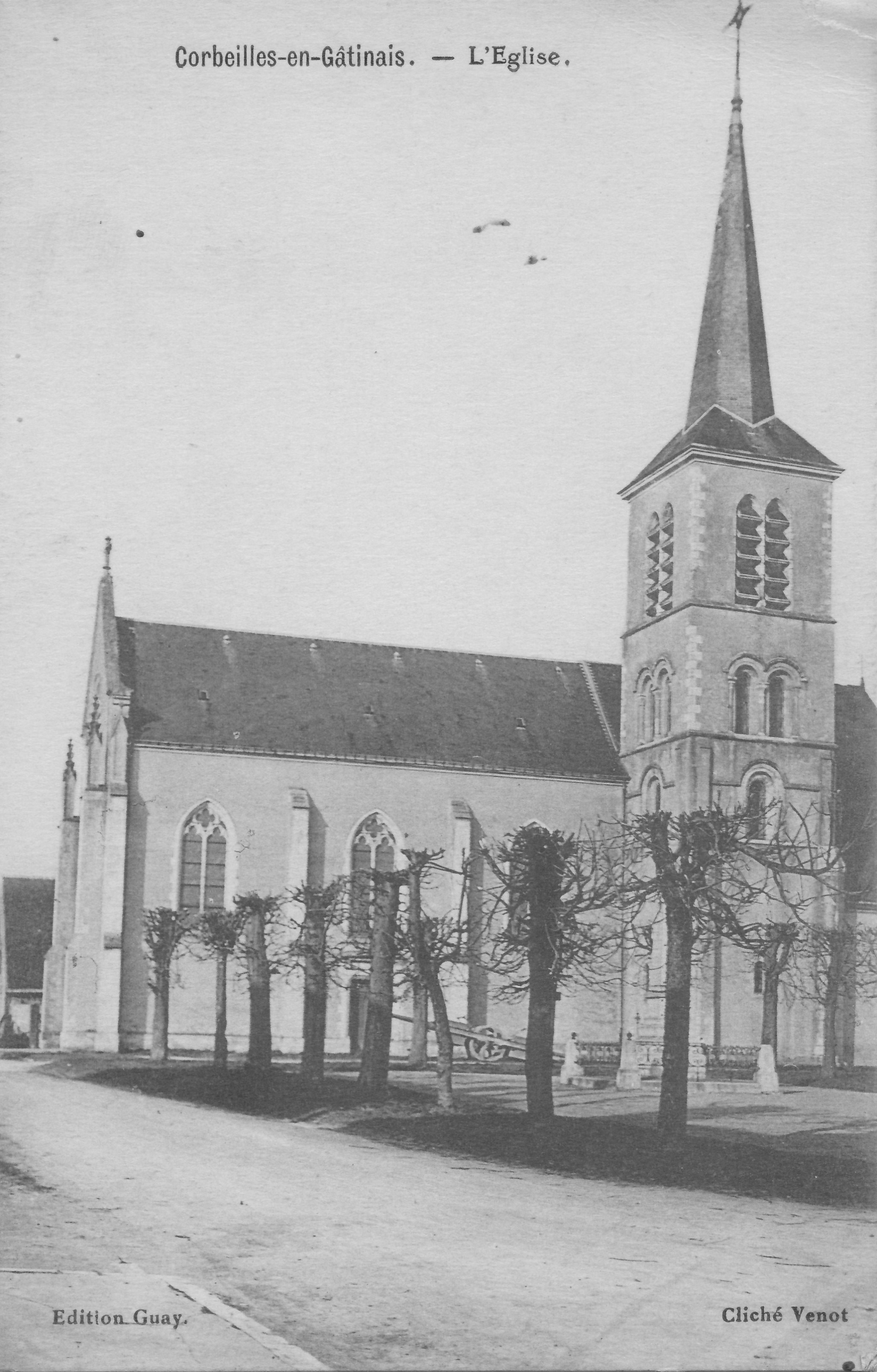 Carte postale ancienne montrant l'église de Corbeilles-en-Gâtinais vers 1939